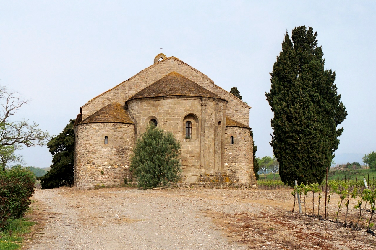 France - Languedoc - Aude - Azille - Chapelle Saint-Étienne de Vaissière